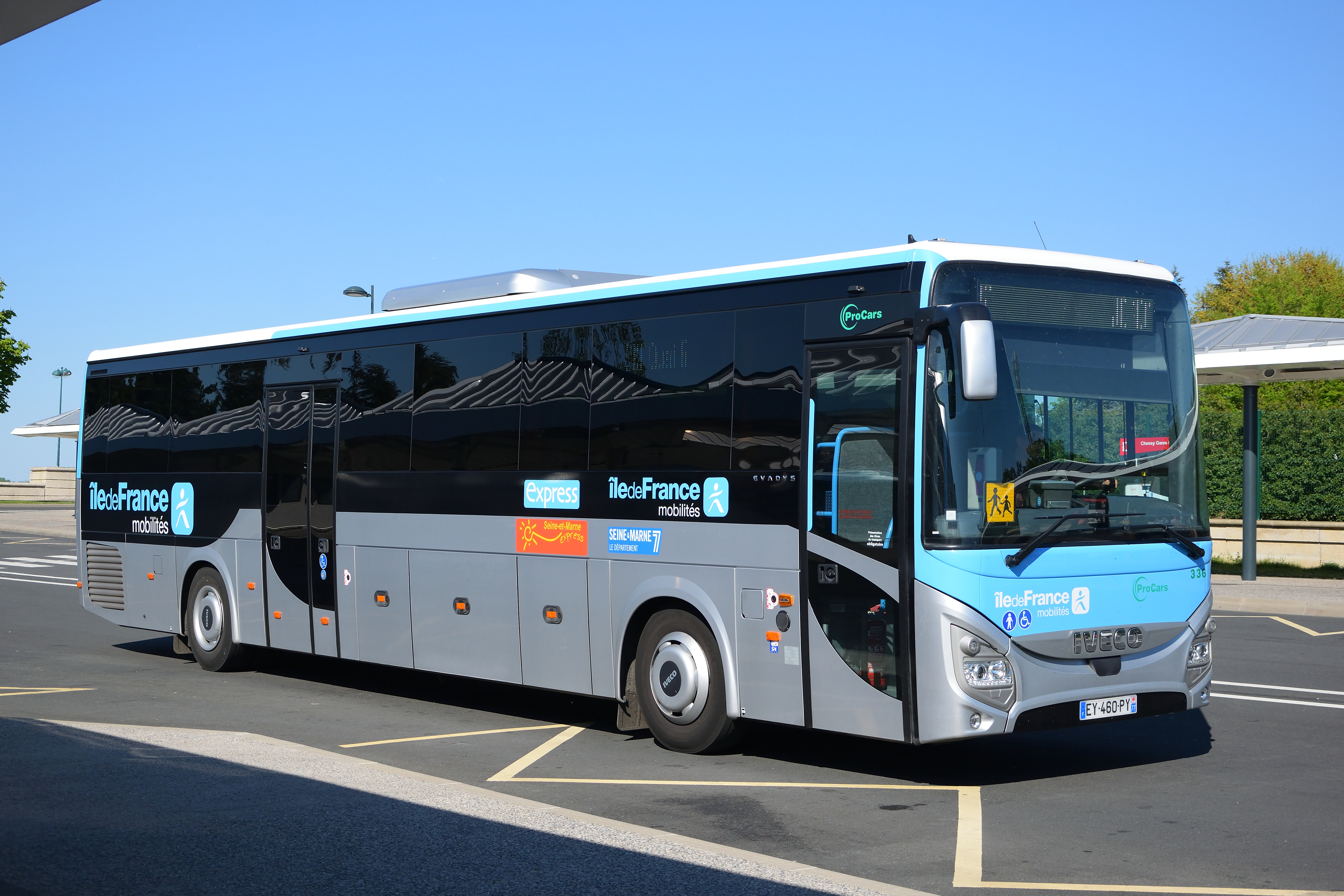 Iveco Evadys Pro Cars n°336 sur la ligne 50 du réseau Seine-et-Marne Express arrivant à l'arrêt Marne-la-Vallée Chessy RER.